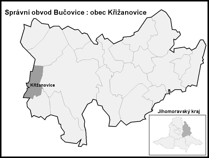 Hranice Křižanovice (Vyškov-(Bučovice)- Czech republic)